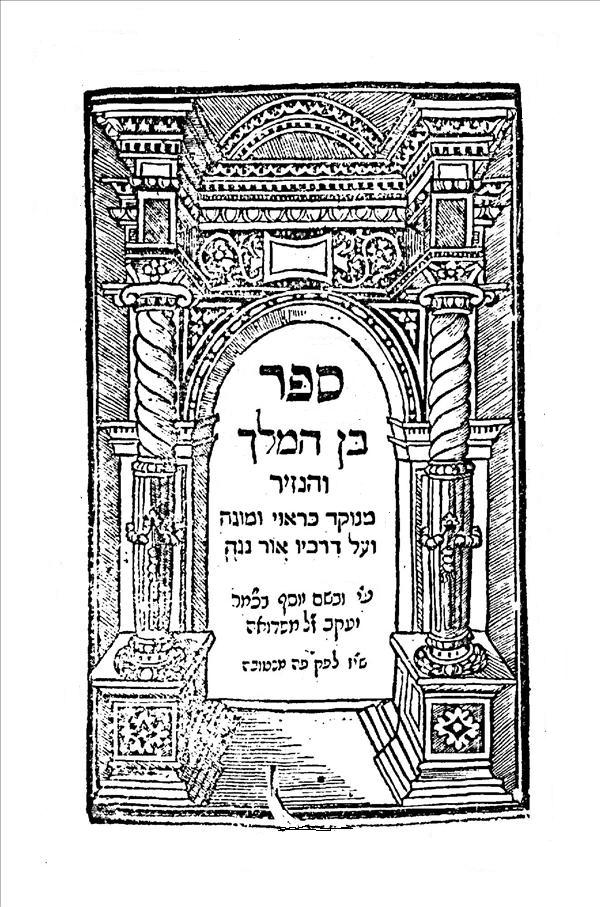 ספר בן המלך והנזיר לאברהם אבן חסדאי